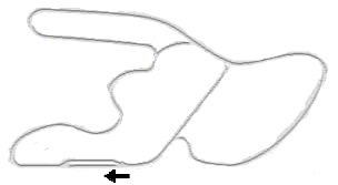 Autódromo Gral. Enrique Mosconi (Allen, Río Negro, Argentina)